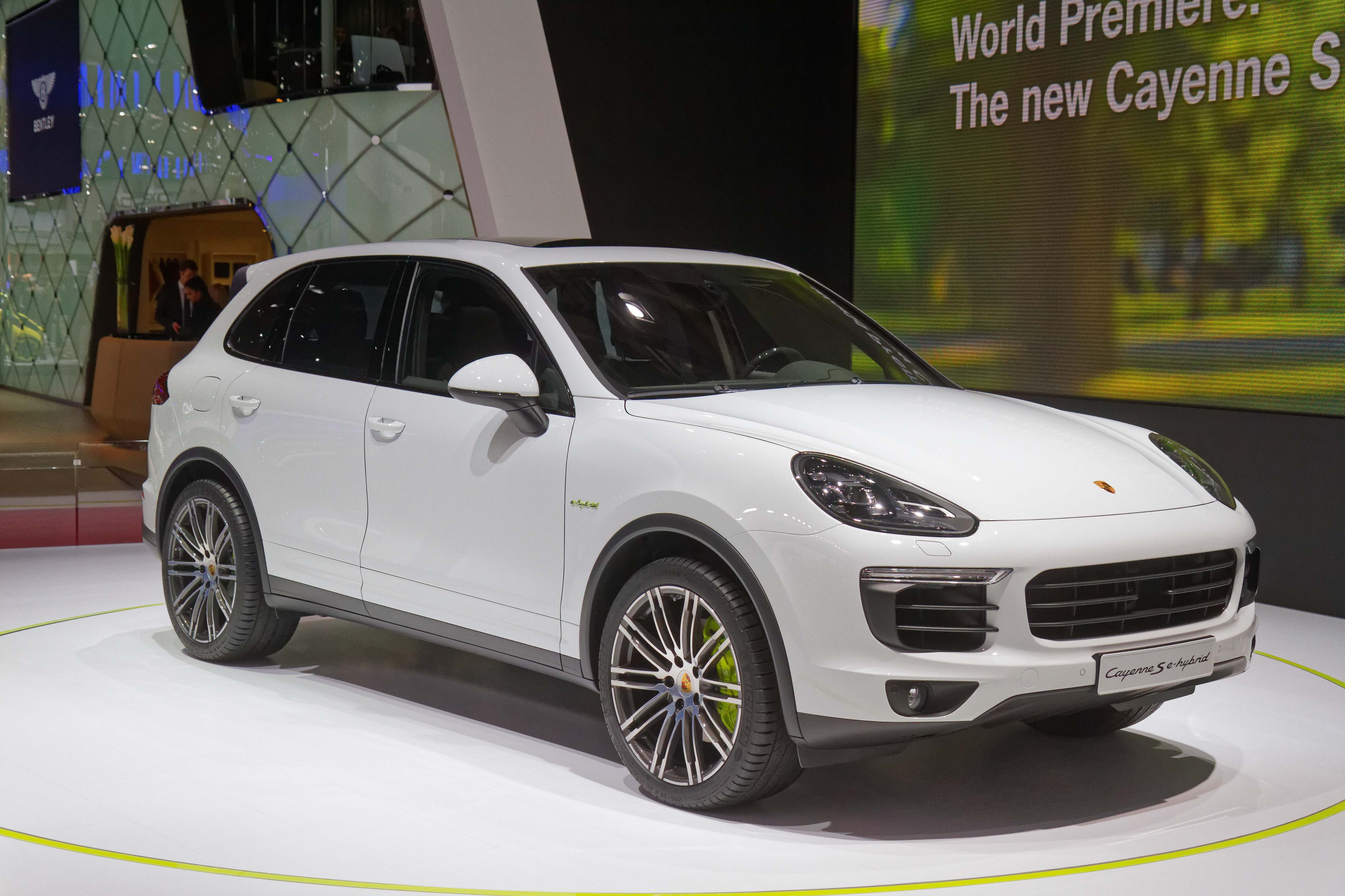 Une Porsche Cayenne S e-hybrid présentée lors du mondial de l'automobile de Paris 2014.